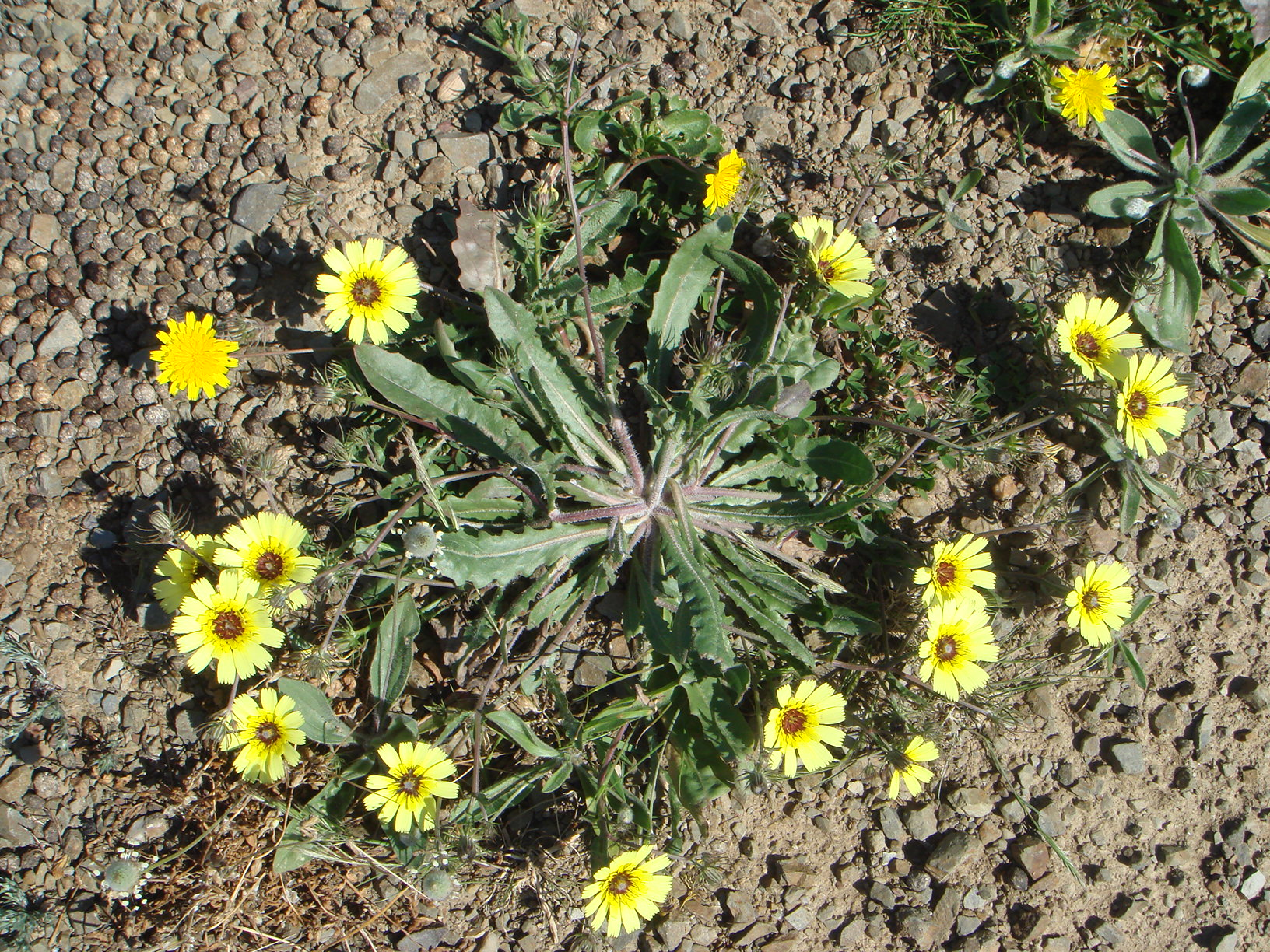 Tolpis barbata, Ceuta, España.